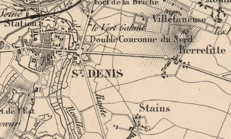 Détail de la carte Chemin de fer du Nord. Carte itinéraire de la partie comprise entre Paris et Amiens / Mr Onfroy de Bréville ingénieur en chef directeur. Dressé par le conducteur des Ponts et chaussées soussigné ; gravé et imprimé chez Gratia. Il présente le passage de la ligne à Saint-Denis près Pierrefitte et Stains